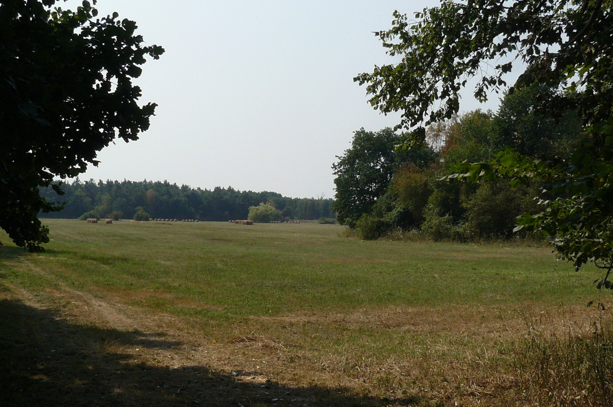 Las Łaszczyński pod Rawiczem.